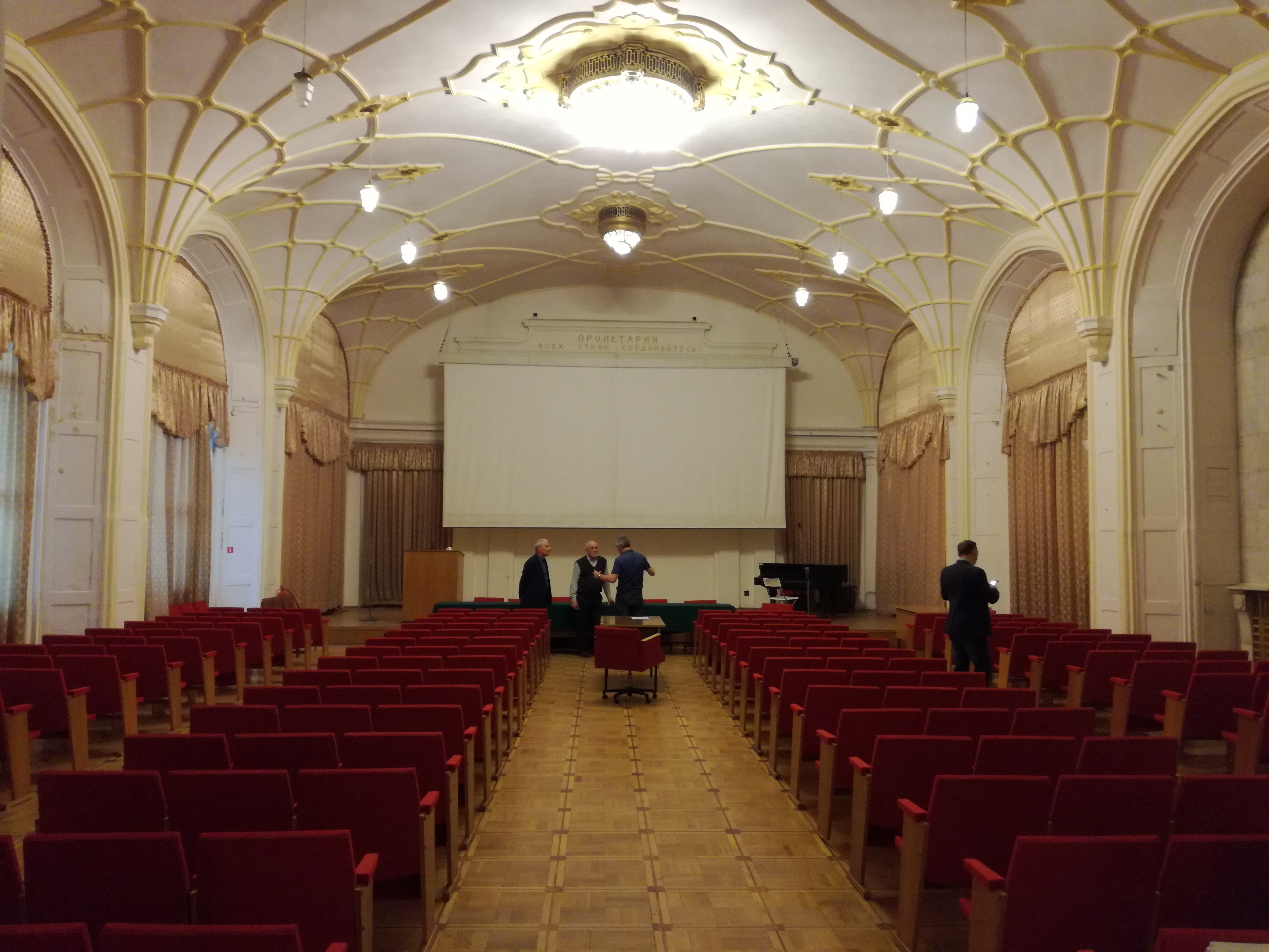 Московское Политехническое общество. Зал заседаний